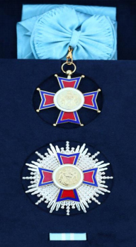 Орден Републике Србије другог степена.